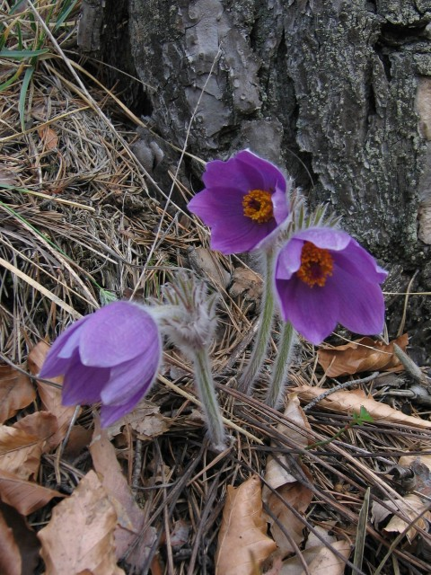 sk: Poniklec prostredný (Anemone slavica (subsp. subslavica), picture taken in Súľovské skaly author: Juloml, apr. 2005